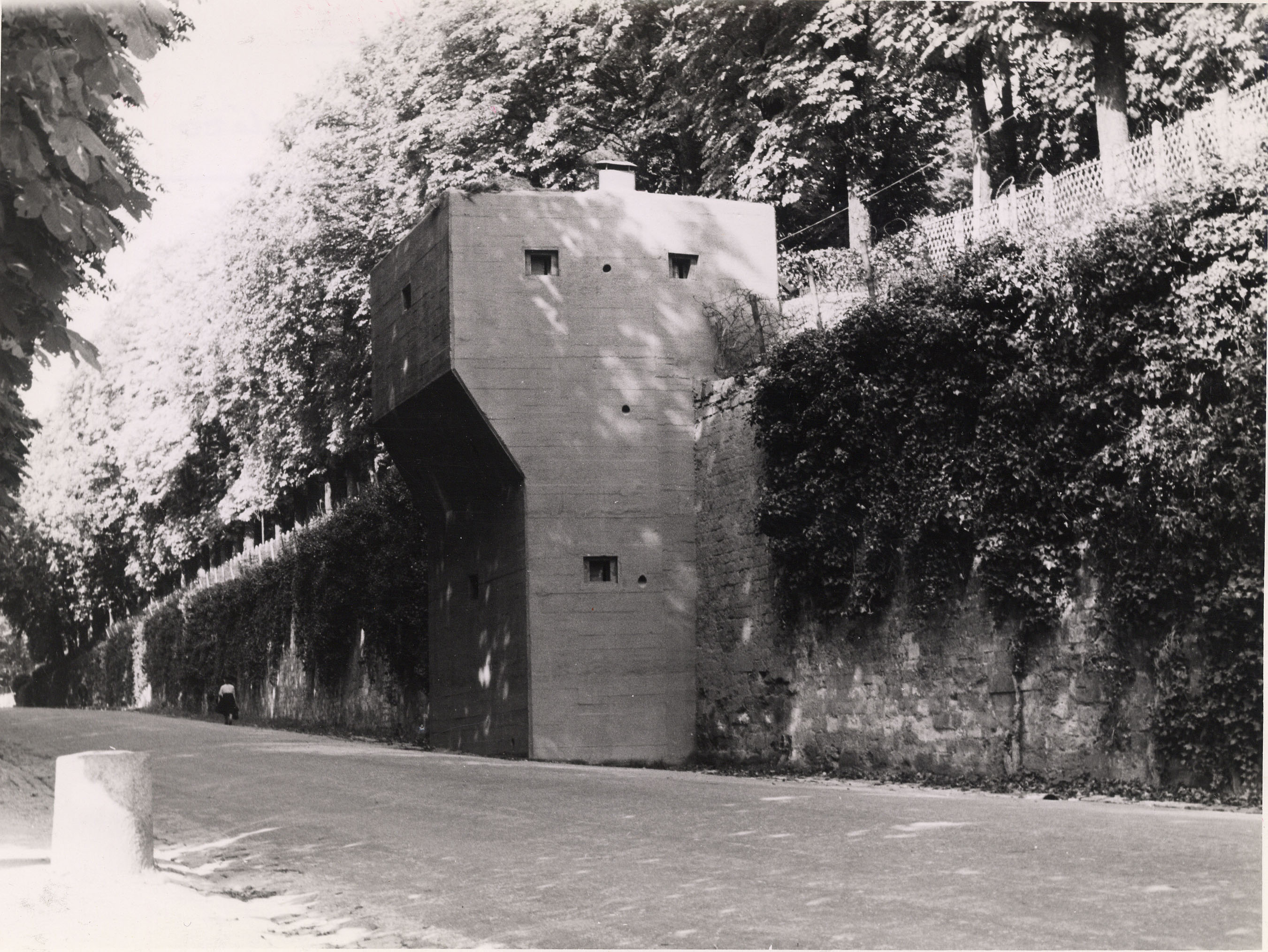 Blockhaus construit sur le mur de soutènement du jardin du Trocadéro, allée de la carrière